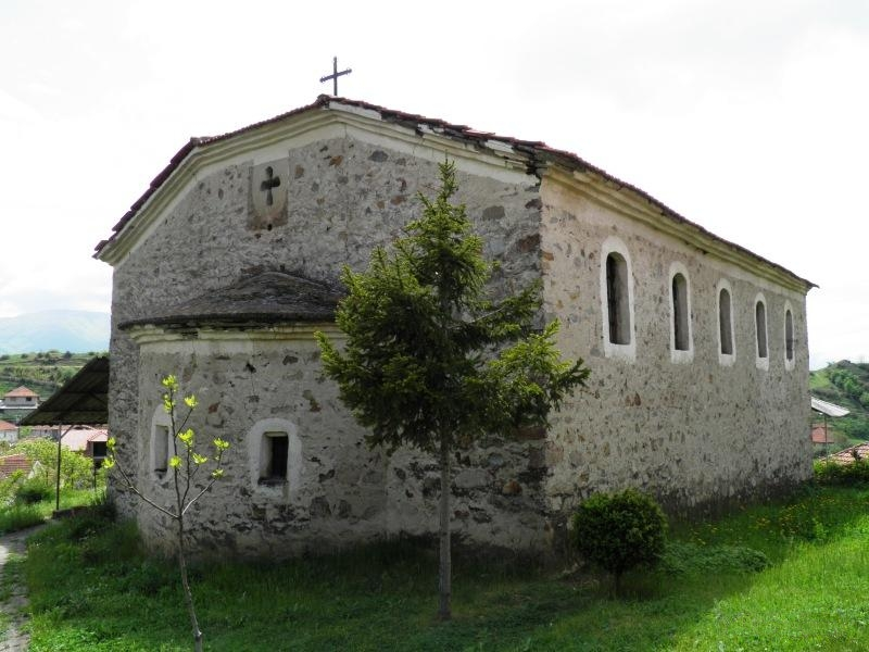 Црквата Рождение на Пресвета Богородица во Пекљани, Виничко